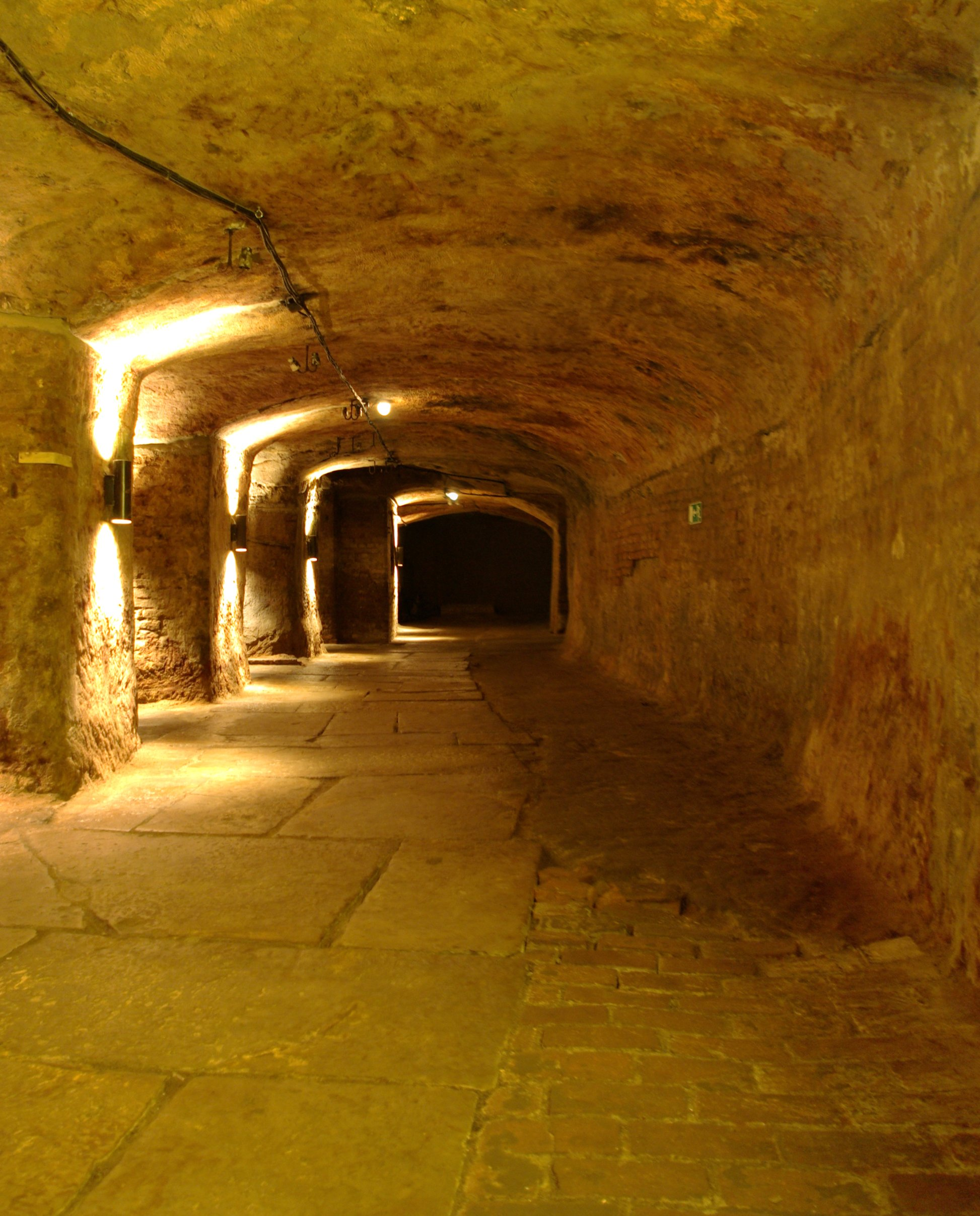 Felsengänge in Nürnberg